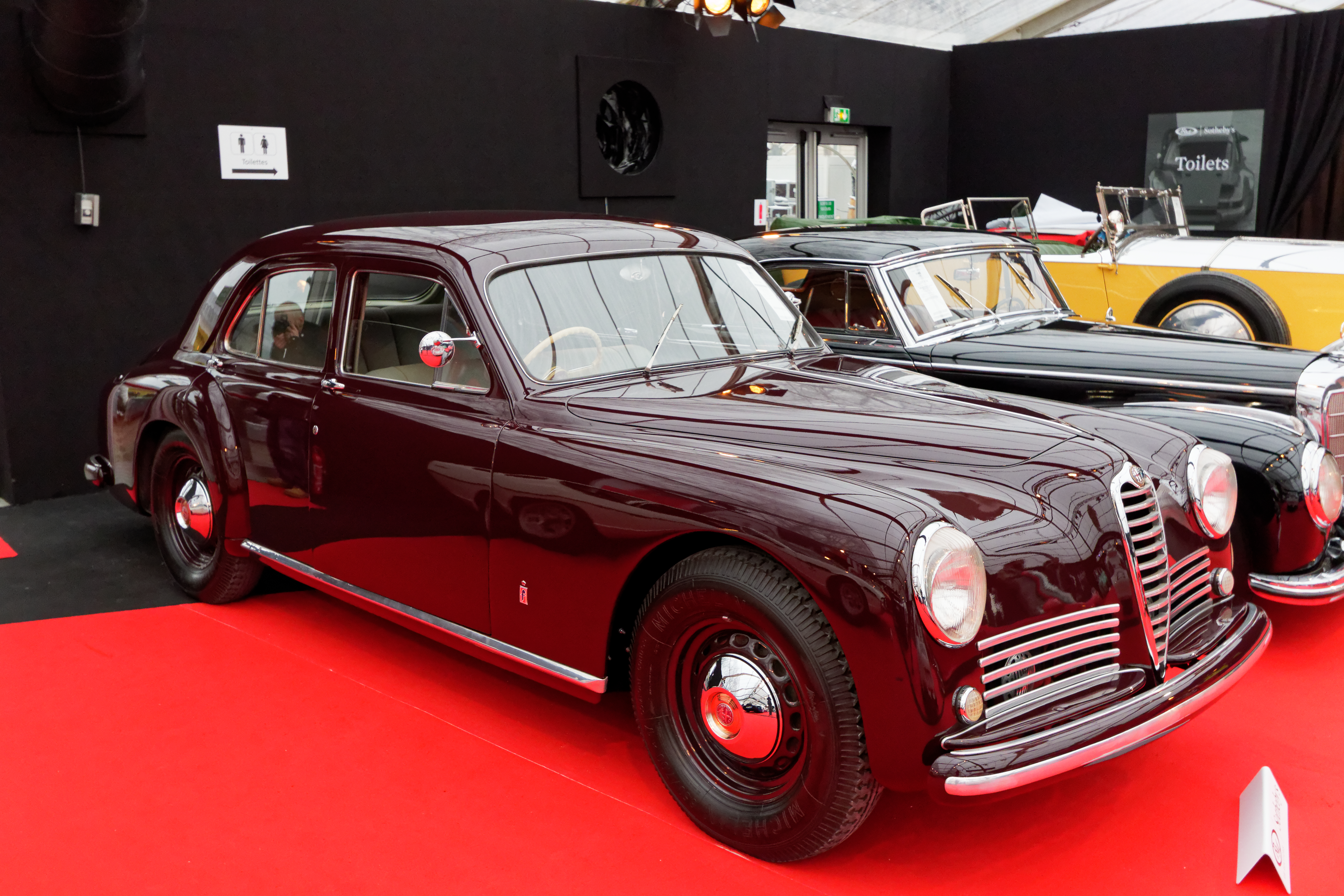 Un véhicule exposé lors de la vente RM Sotheby’s 2018 aux Invalides à Paris.